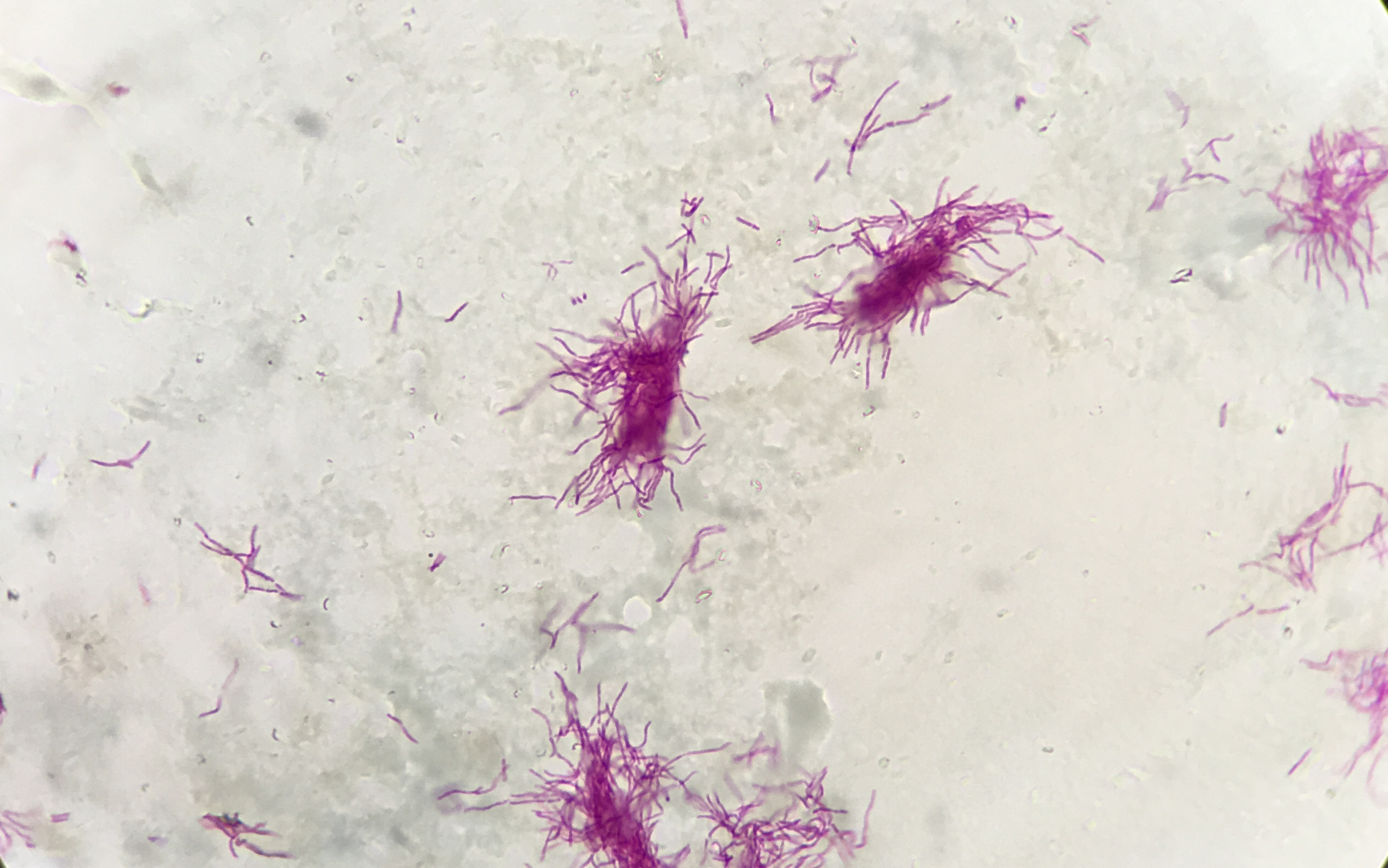 Nocardia spp. nach Kinyounfärbung, 100x Ölimmersionsobjektiv, 10x Okular, iPhone